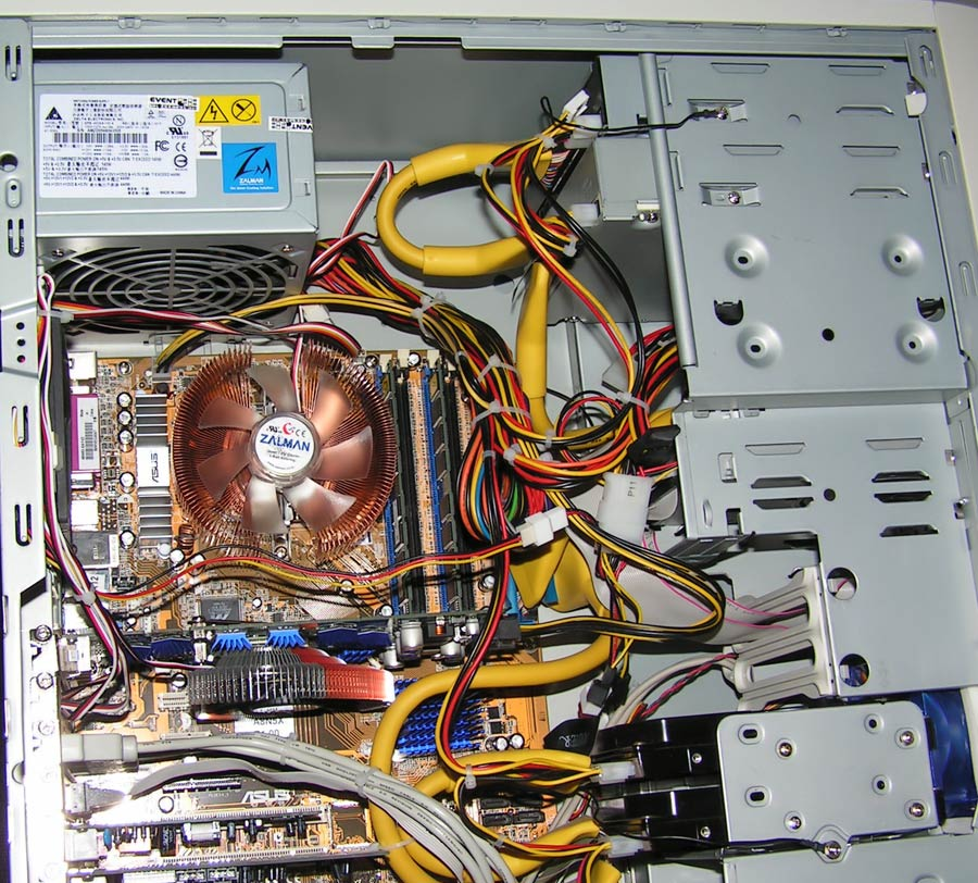 Air cooling in overclocked system (Zalman CNPS 7000Cu-B LED, Zalman VF700-AlCu, Zalman ZM-NB47J) Воздушное охлаждение разогнанных компонент компьютера (Кулер на ЦП Zalman CNPS 7000Cu-B LED, кулер на графическом процессоре и чипах памяти видеокарты - Zalman VF700-AlCu, кулер на чипсете материнской платы - Zalman ZM-NB47J)